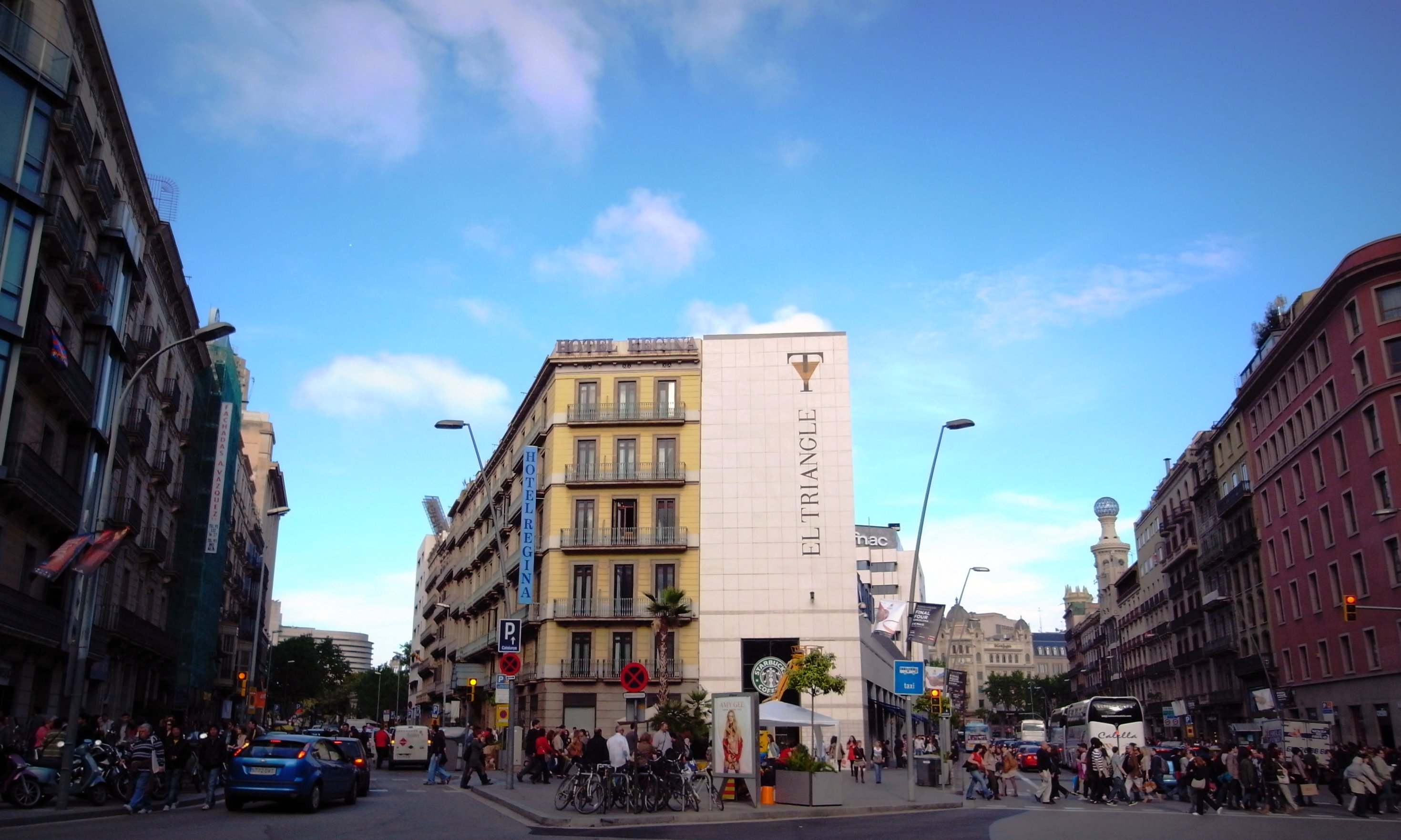 Carrer Bergara i Carrer Pelai, Barcelona. 23.04.2011